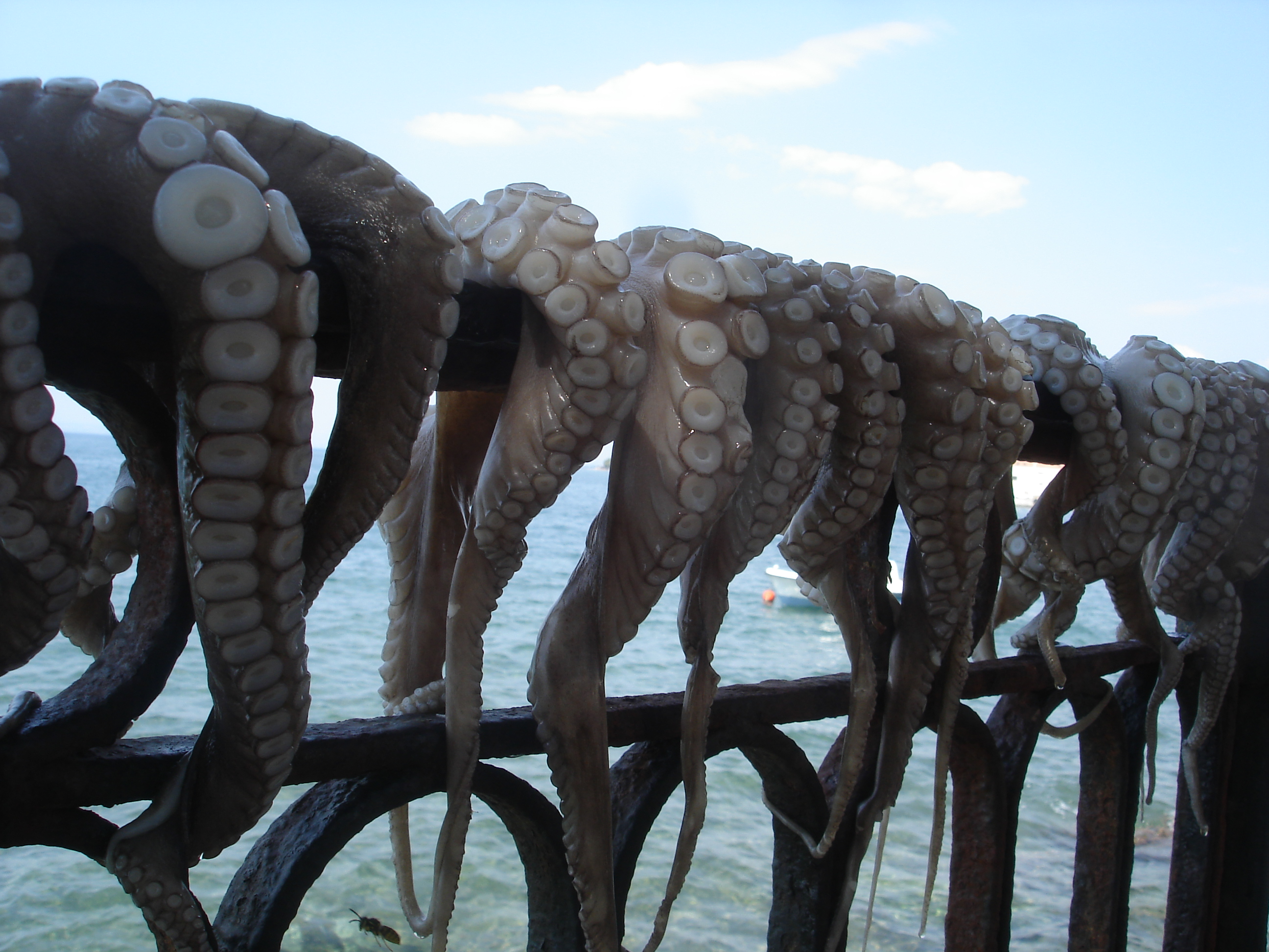 Étalage de poulpes, pour un séchage sur les quais de la ville de Amarynthos sur l'ile d'Eubée (Greece)